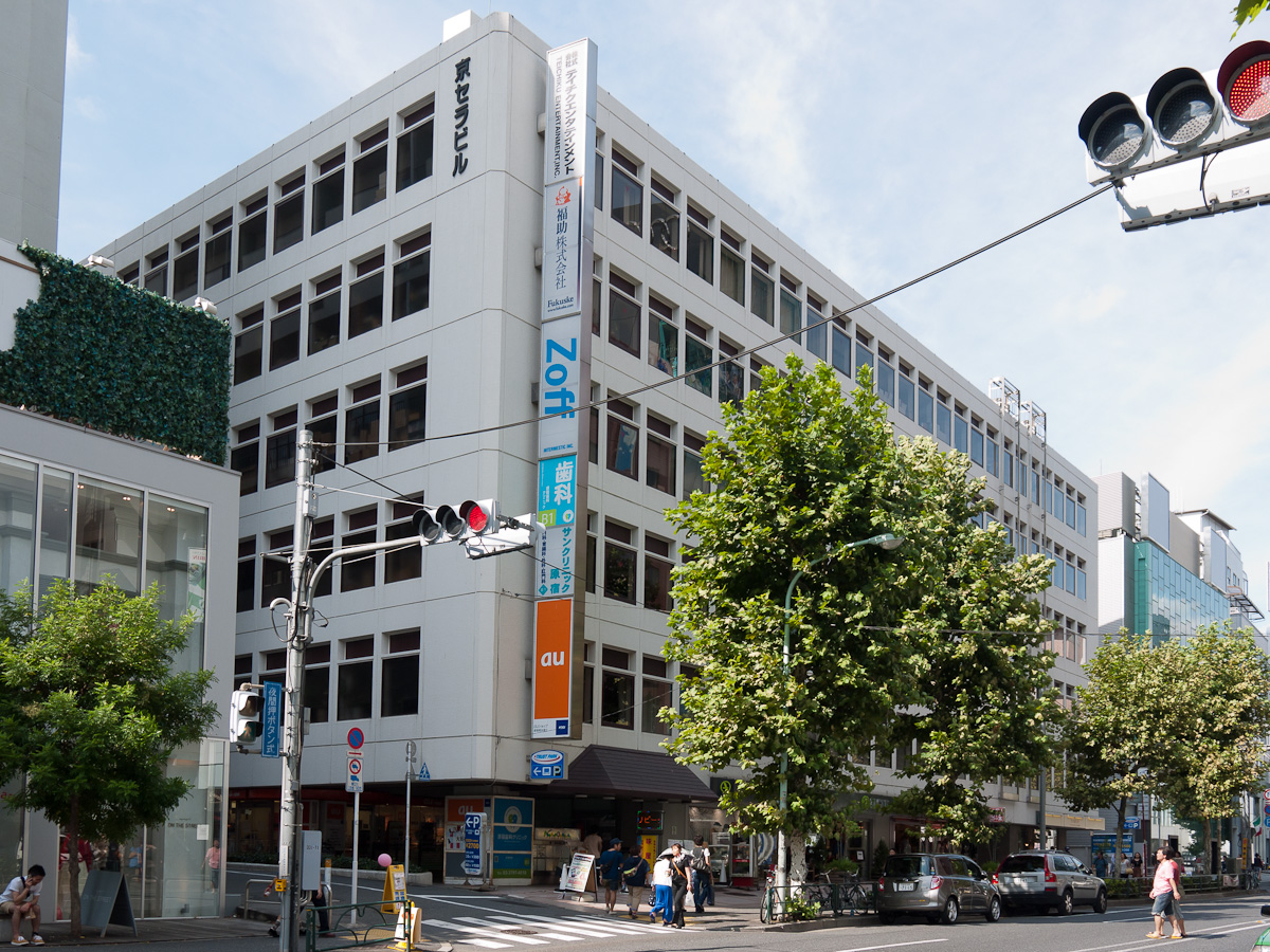 京セラ原宿ビル。旧ヤシカカメラ本社跡地。東京都渋谷区神宮前6丁目。